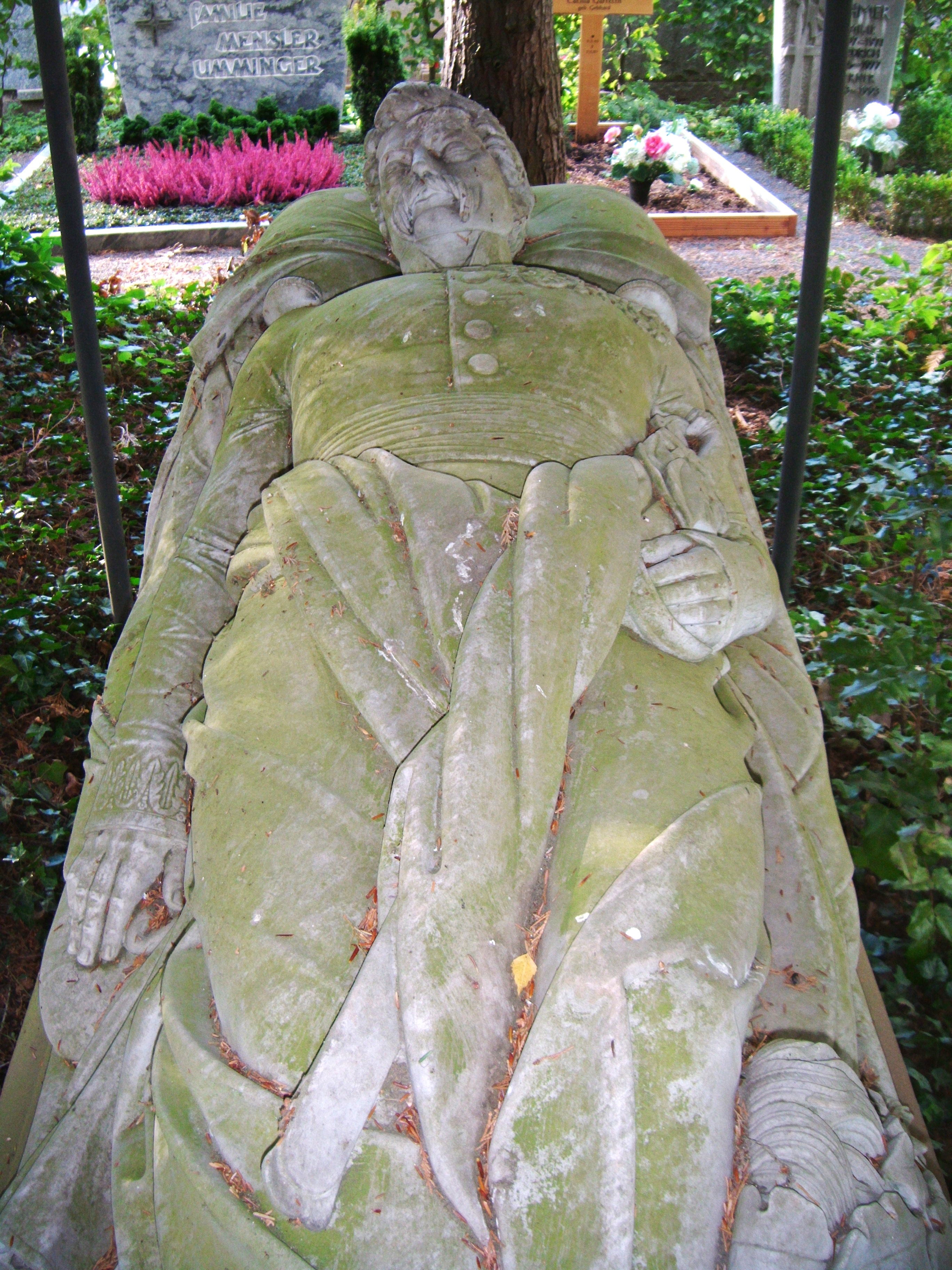 Karl Freiherr von Pflummern (1787-1850), Bayerischer Generalmajor und Festungskommandant von Landau (Pfalz), Grabmal, Friedhof Landau